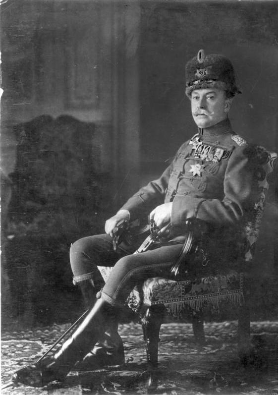 Hans Heinrich XV. Fürst von Pleß Präsident des Union-Klubs seit 1910 und des Berliner Rennvereins 11.10.1916